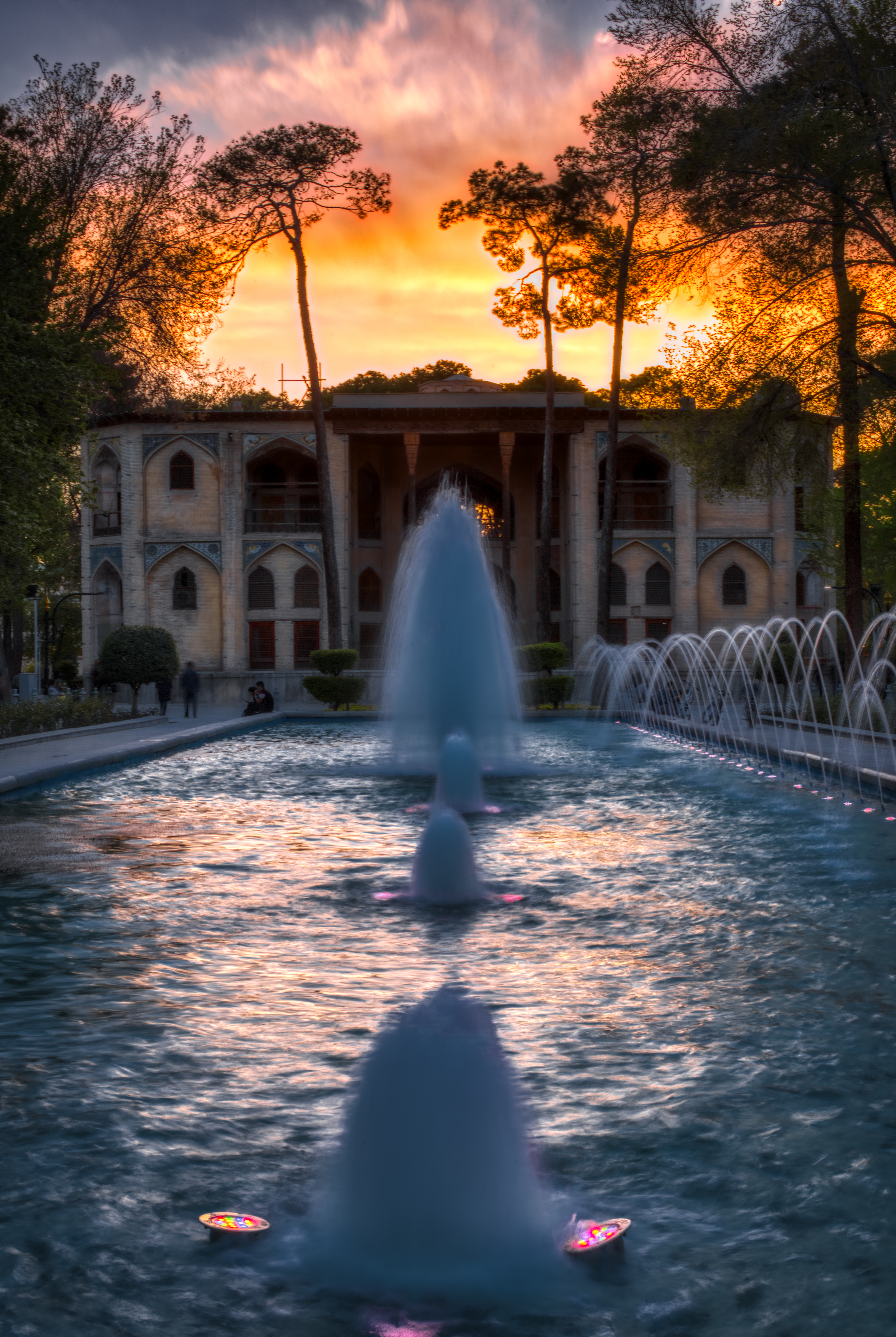 عوامل و بازیگران سریال هست بهشت امیر حسین شریفی, فرامرز مختاری, حسن سلیمانی, دانیال حاجی برات, افشین سنگ چاپ آزاده ریاضی, مانی حیدری و علی حسینی...